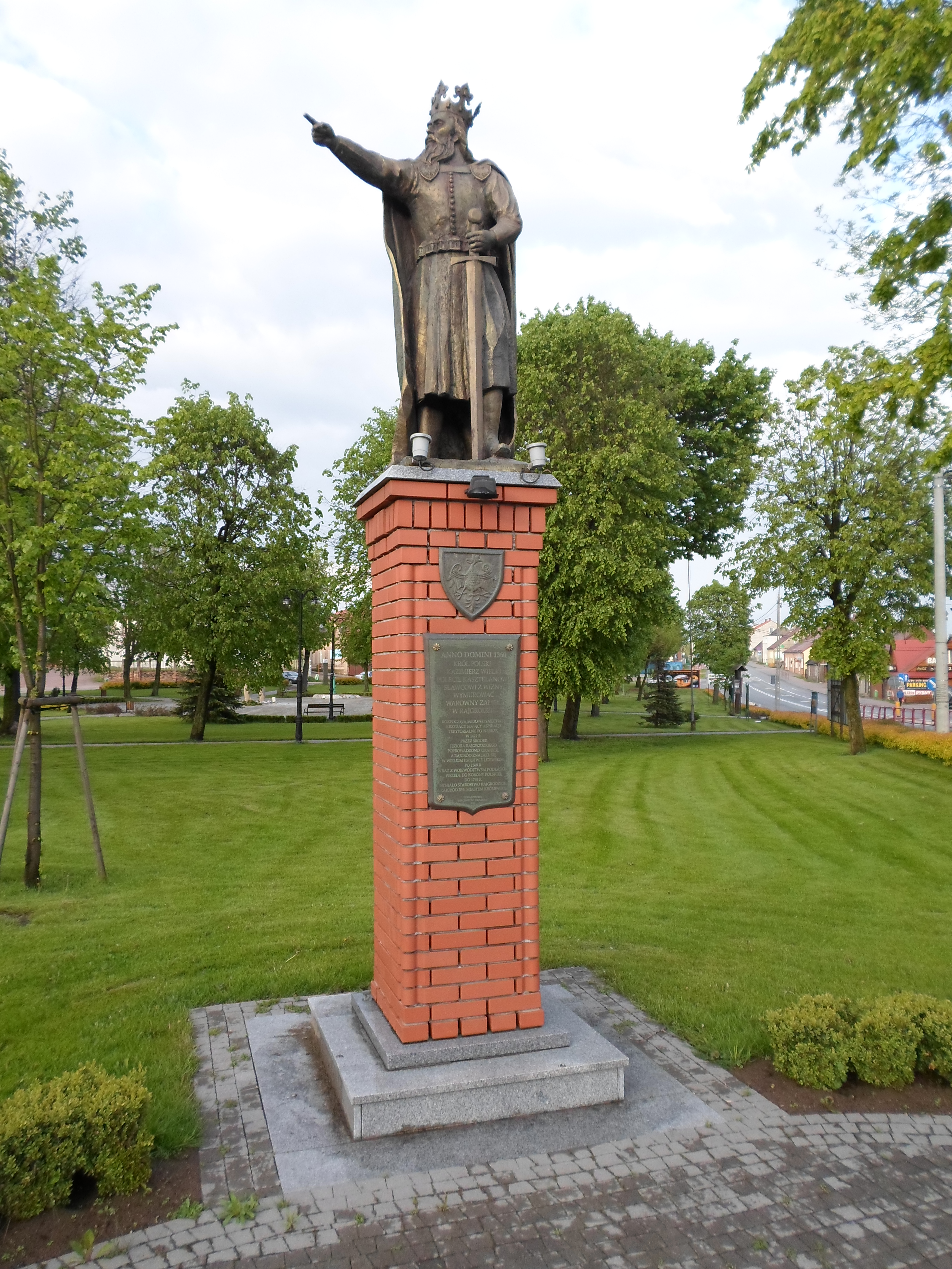 Pomnik króla Polski Kazimierza III Wielkiego w Rajgrodzie